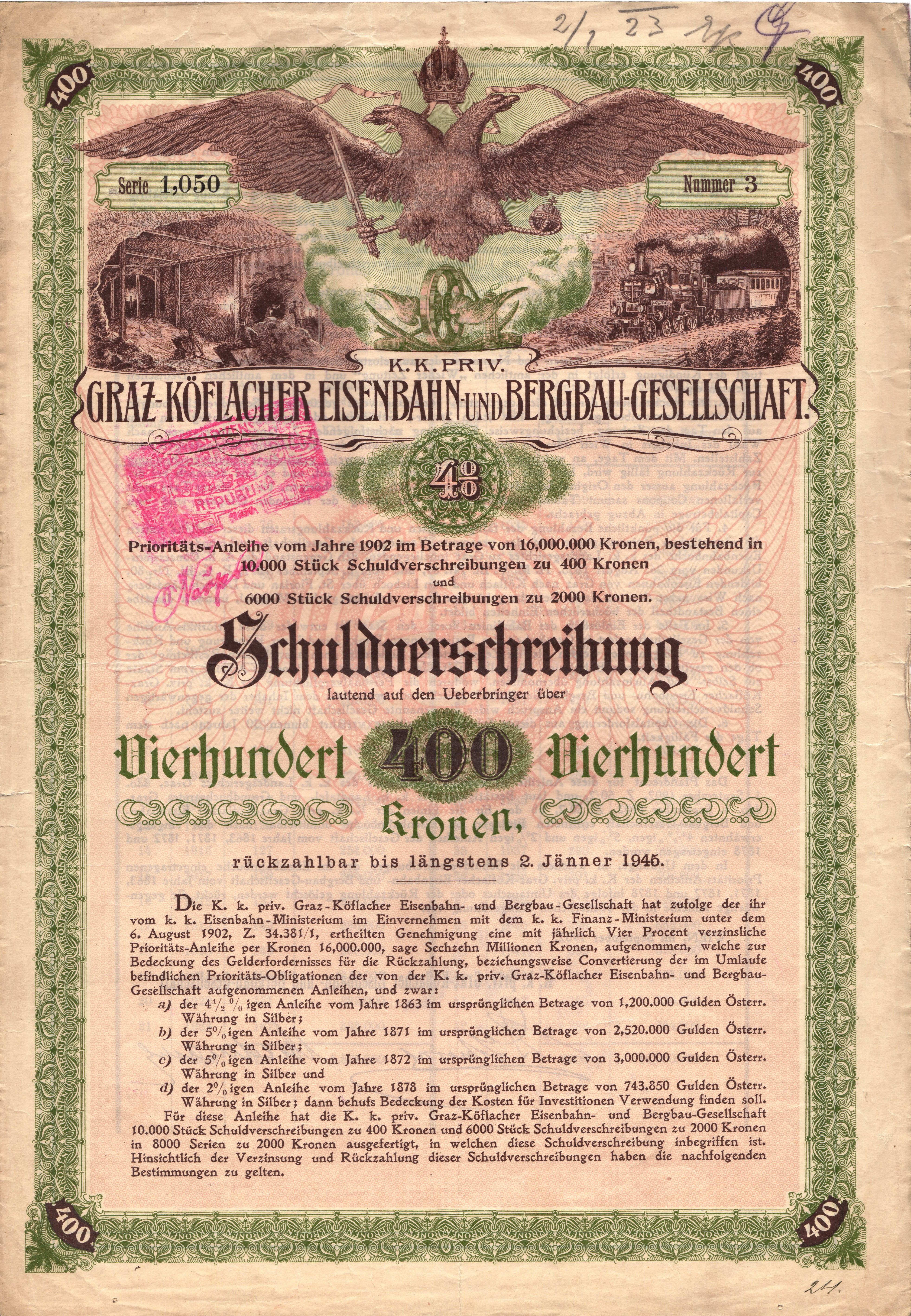 Bond of the Graz-Köflacher Eisenbahn- und Bergbau-Gesellschaft, issued September 1902